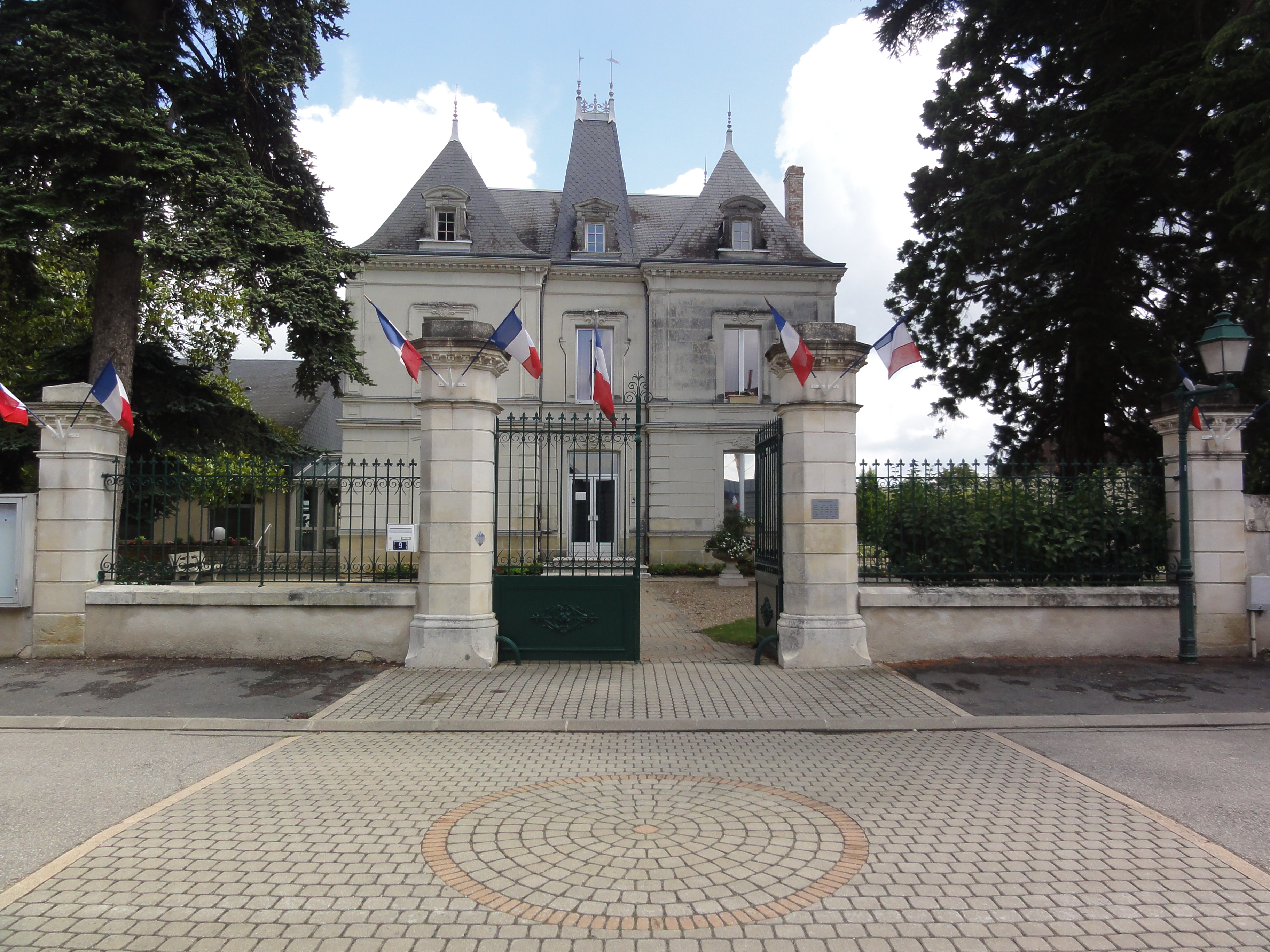 Ingrandes-sur-Vienne (Vienne) Mairie